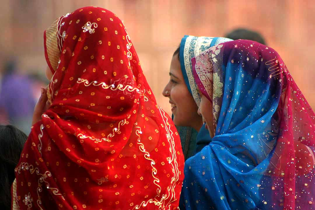 Agra, India